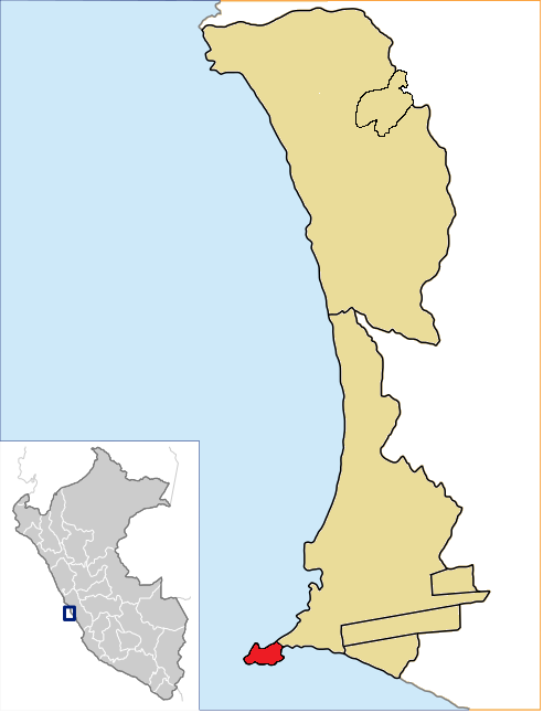 La Punta Distrito